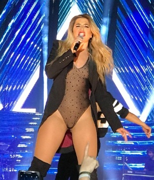 Lola Índigo (antes Mimi Doblas) con Sam Vázquez biskaia arena 24-6-18